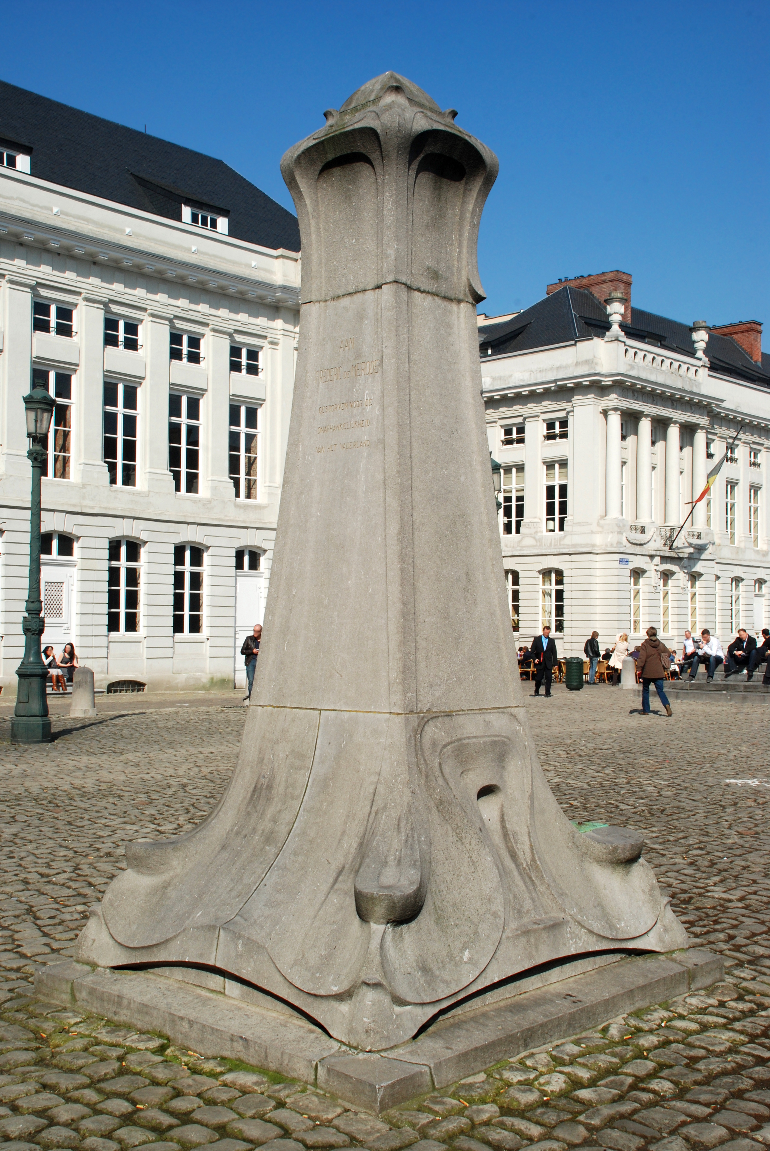 Belgique - Bruxelles - Monument au comte Frédéric de Mérode